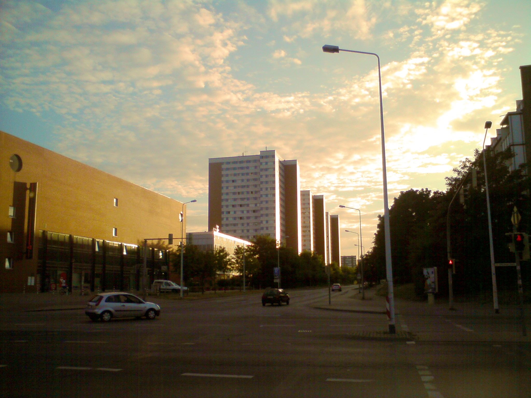 Rigaer Straße, Rostock - Lütten Klein